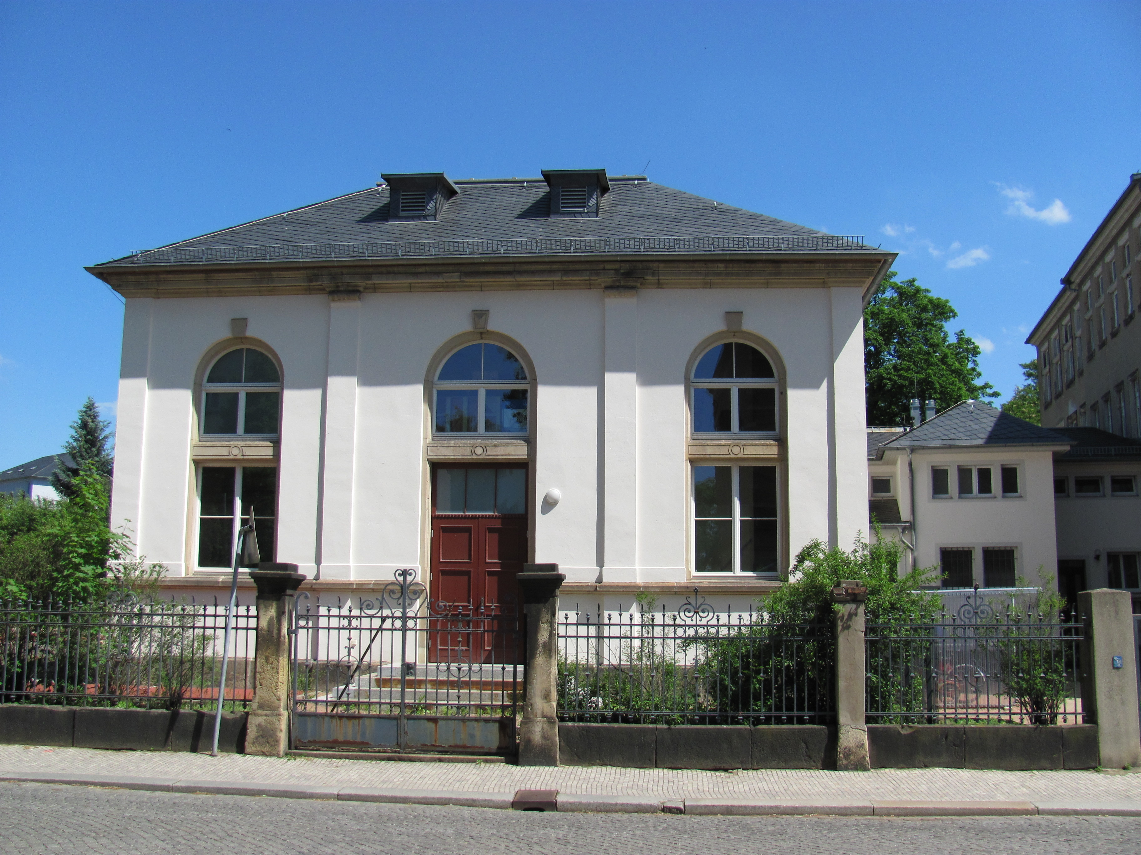 Radebeul Schulturnhalle der Schillerschule